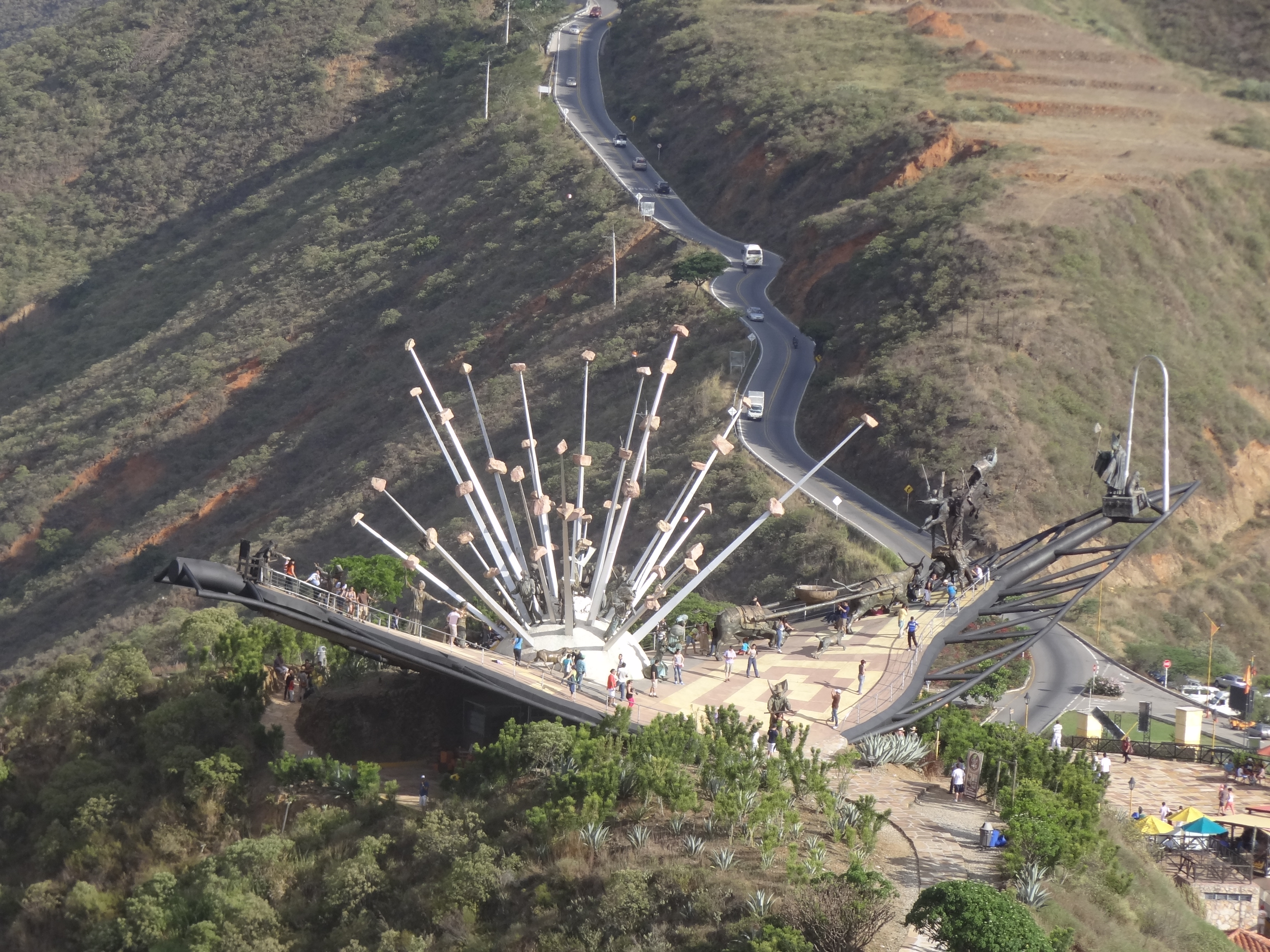 Monumento a la cultura santandereana en el Parque Nacional del Chicamocha